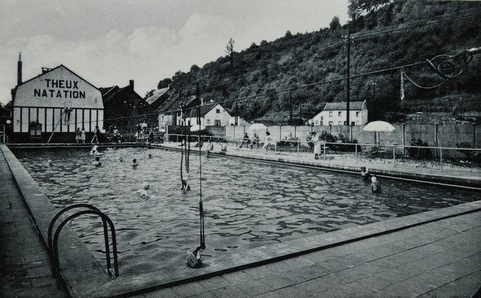 Sur cette carte postale des années 50, l'on aperçoit encore le tremplin de 3 m (aujourd'hui enlevé) sur la façade de la maison du maître-nageur, ainsi que le filin tendu sur toute la longueur de la piscine (filin enlevé lui aussi), utilisé auparavant pour suspendre les jeunes enfants pendant leurs cours de natation !